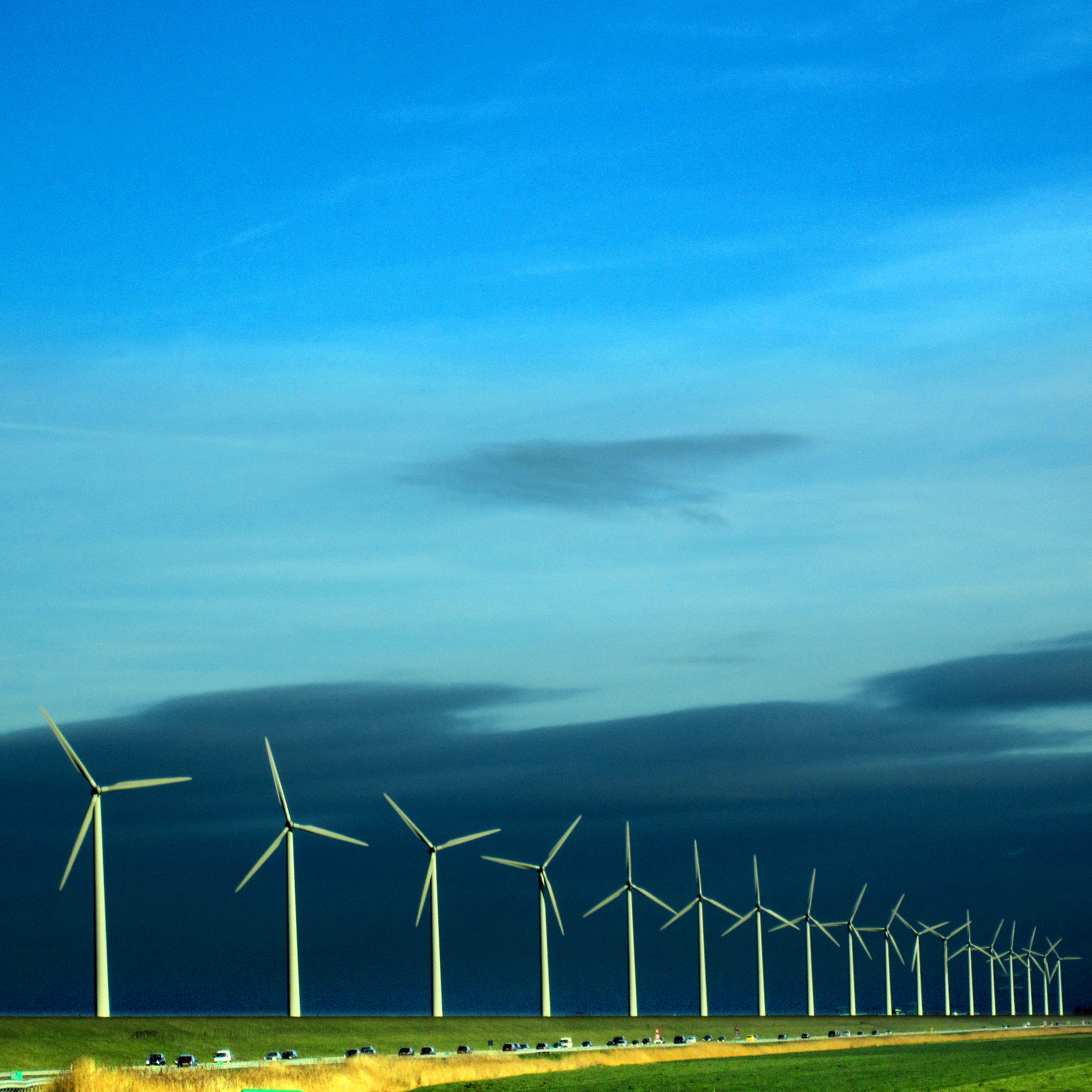 Windmolens